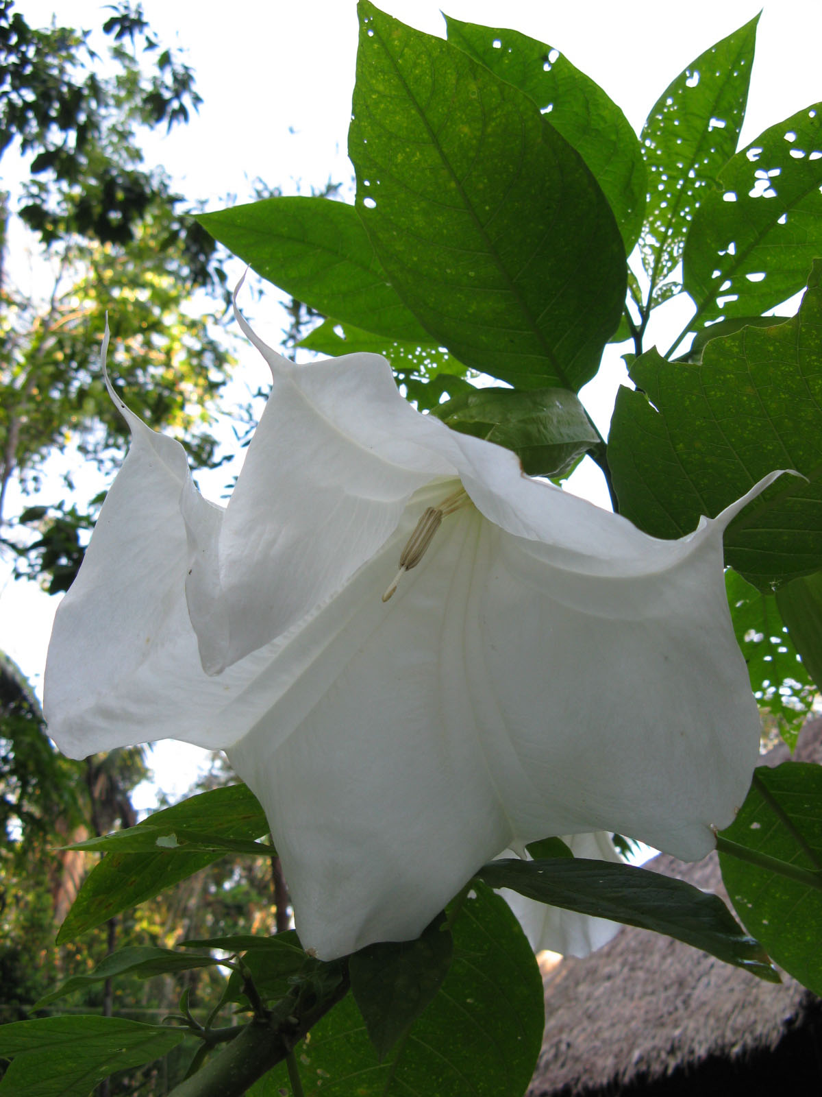 Цветок Бругманзии древовидной